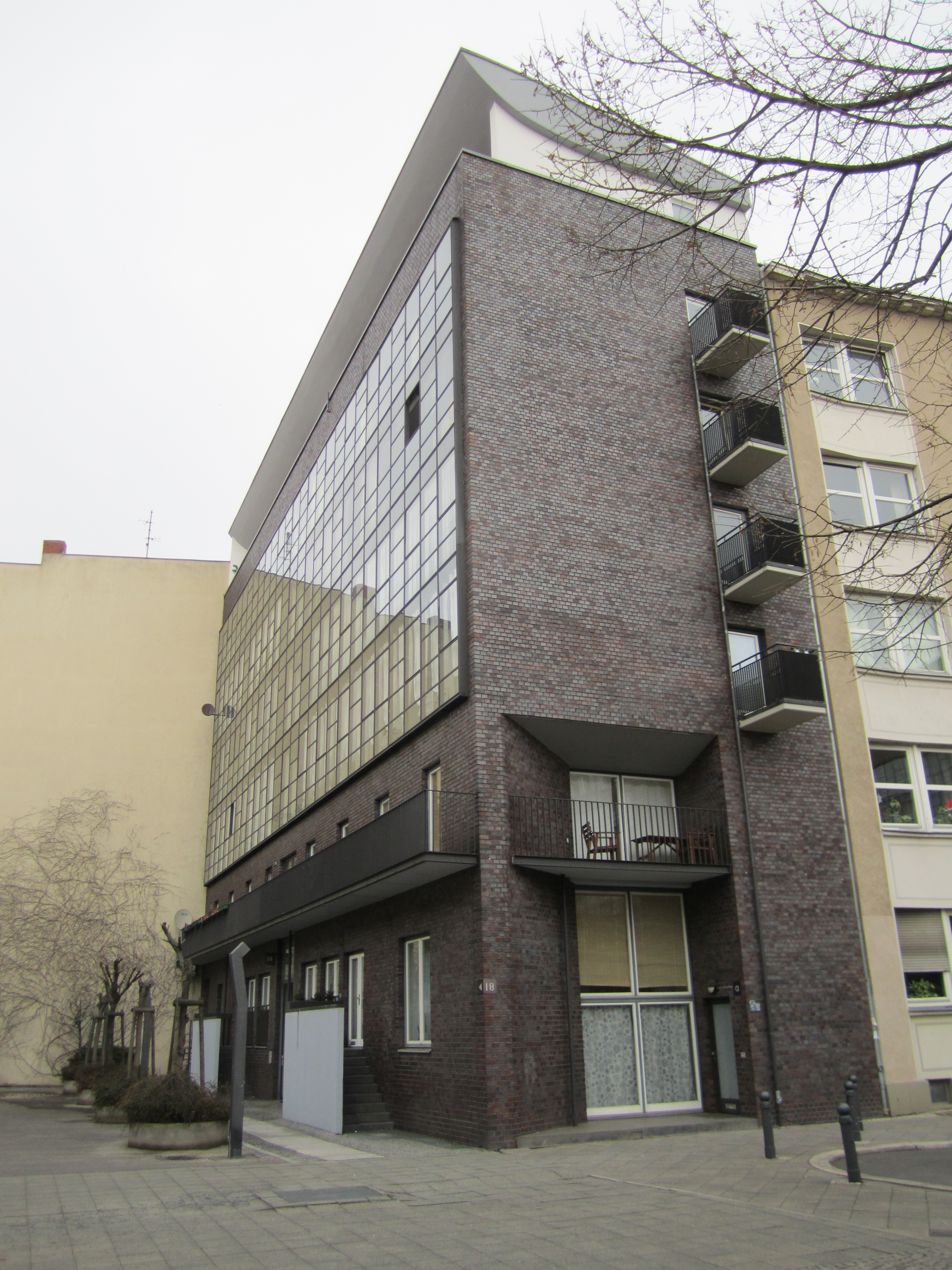 Haus in der Eosanderstraße, Berlin.